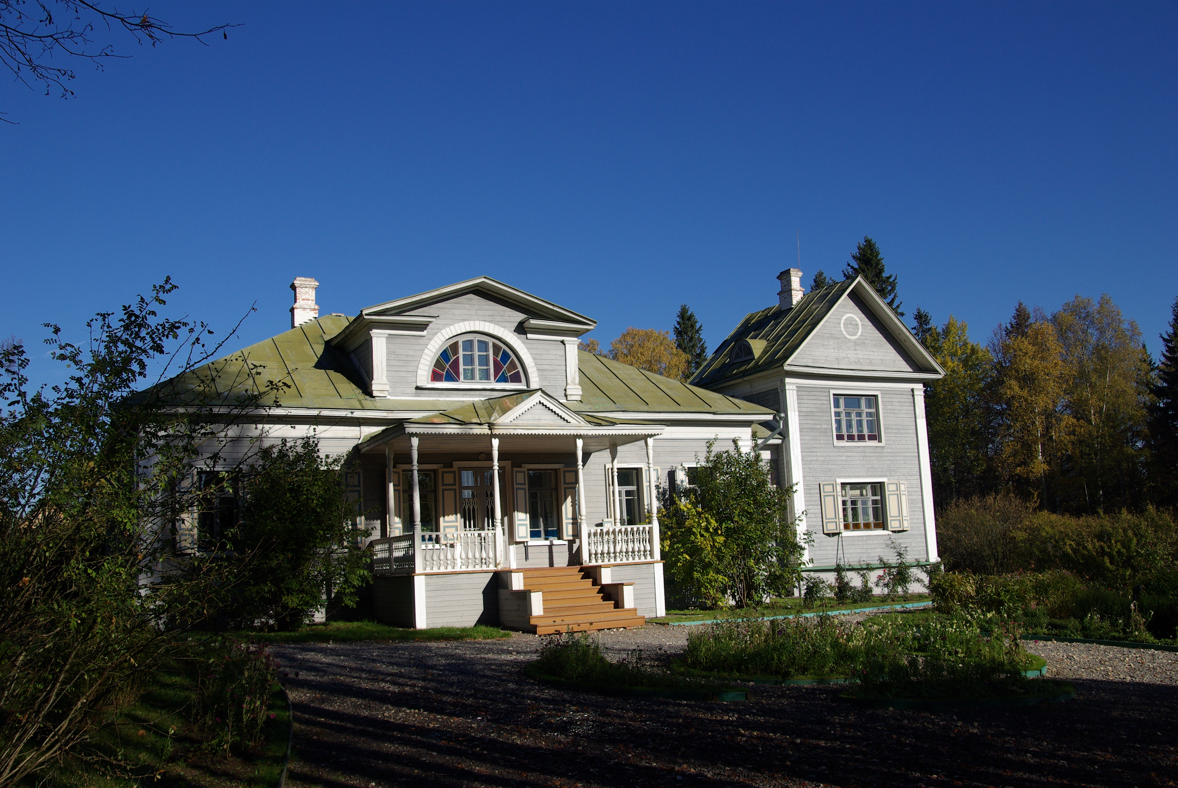 Усадьба А.А. Блока "Шахматово"